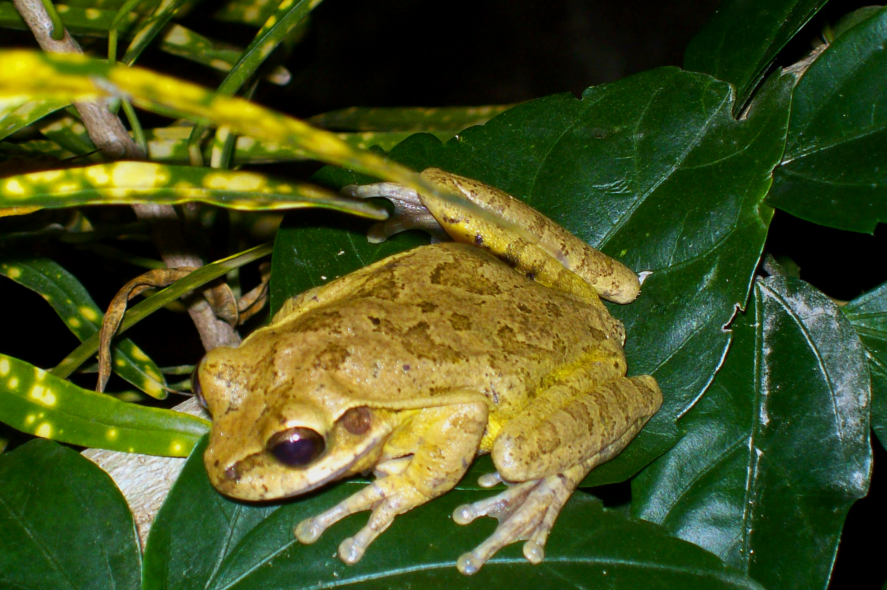 Smilisca baudinii